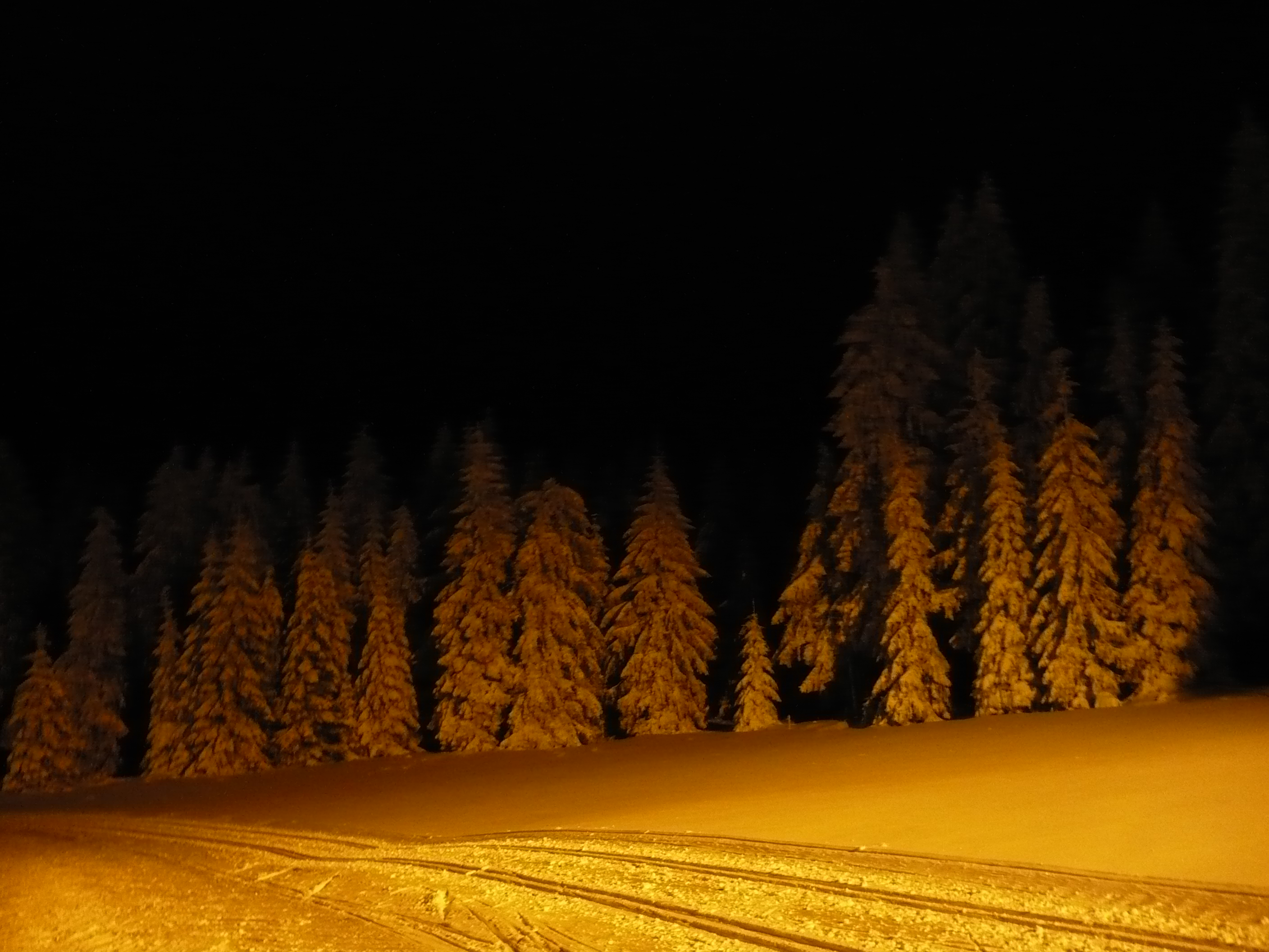 Thurner Nachtloipe